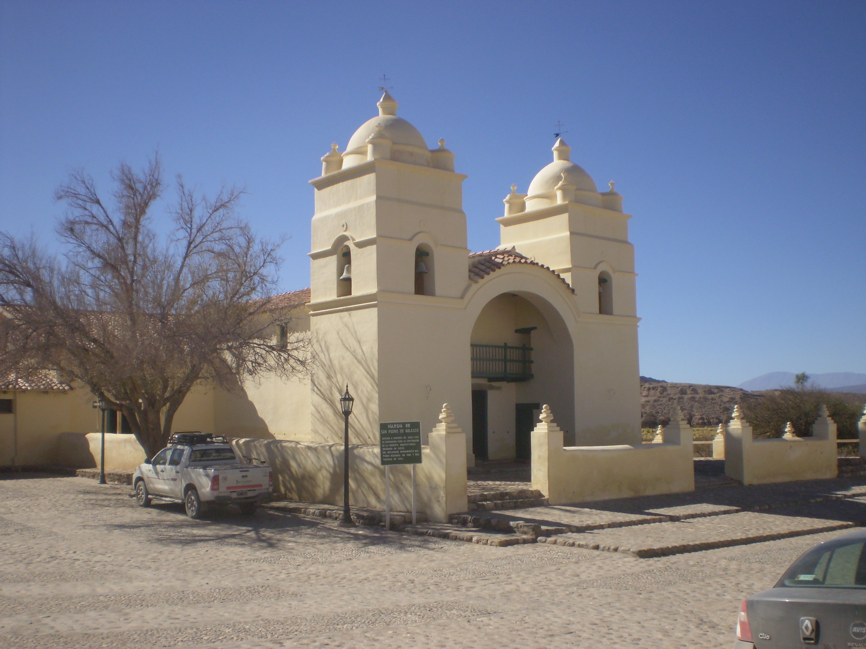 Iglesia San Pedro de Nolasco en Molinos (Salta). Fundada en el S XVIII y declarada MHN en 1942.